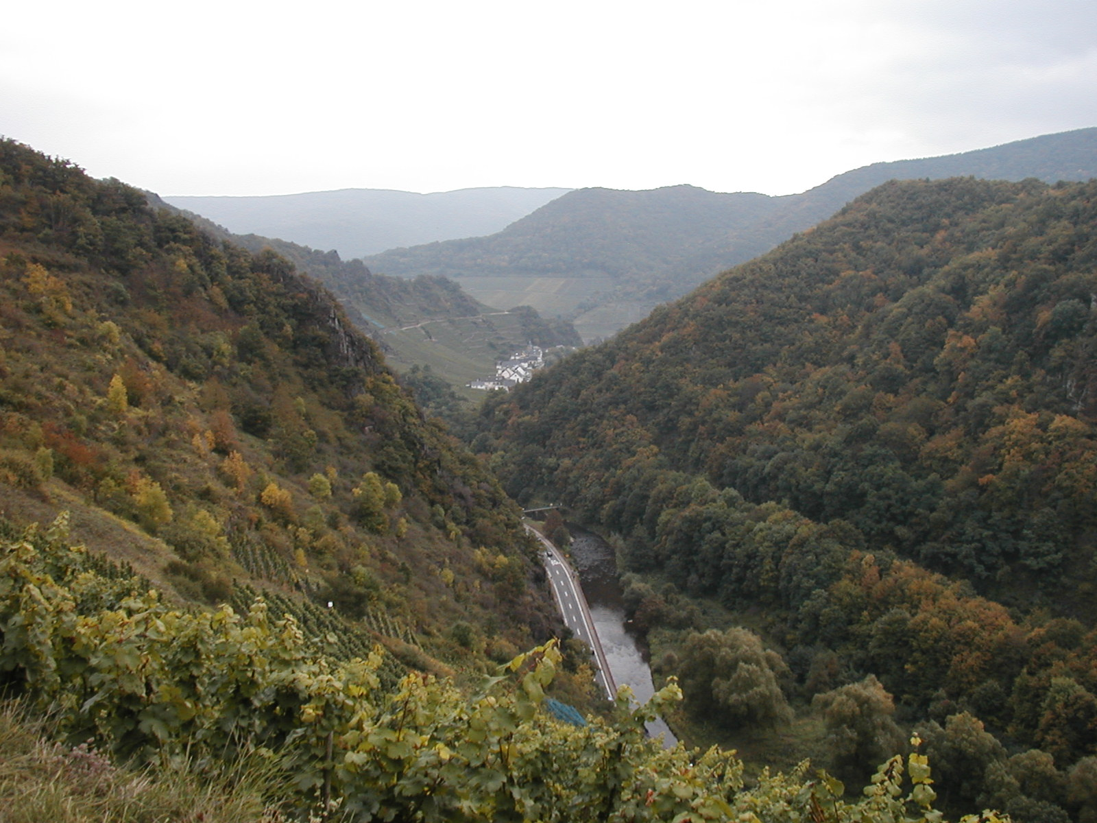 Ahrtal von oben fotografiert